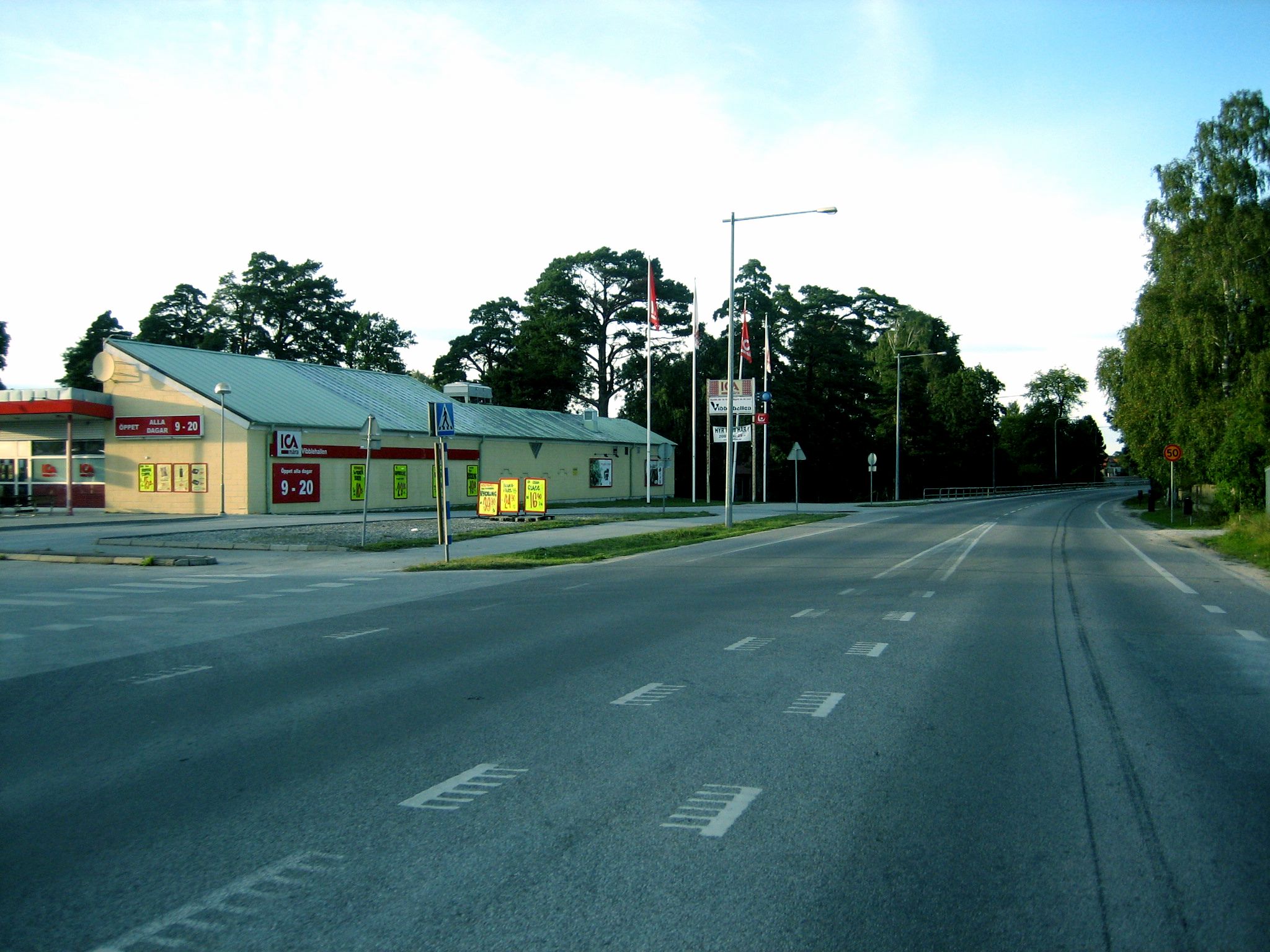 "Vibble Centrum"